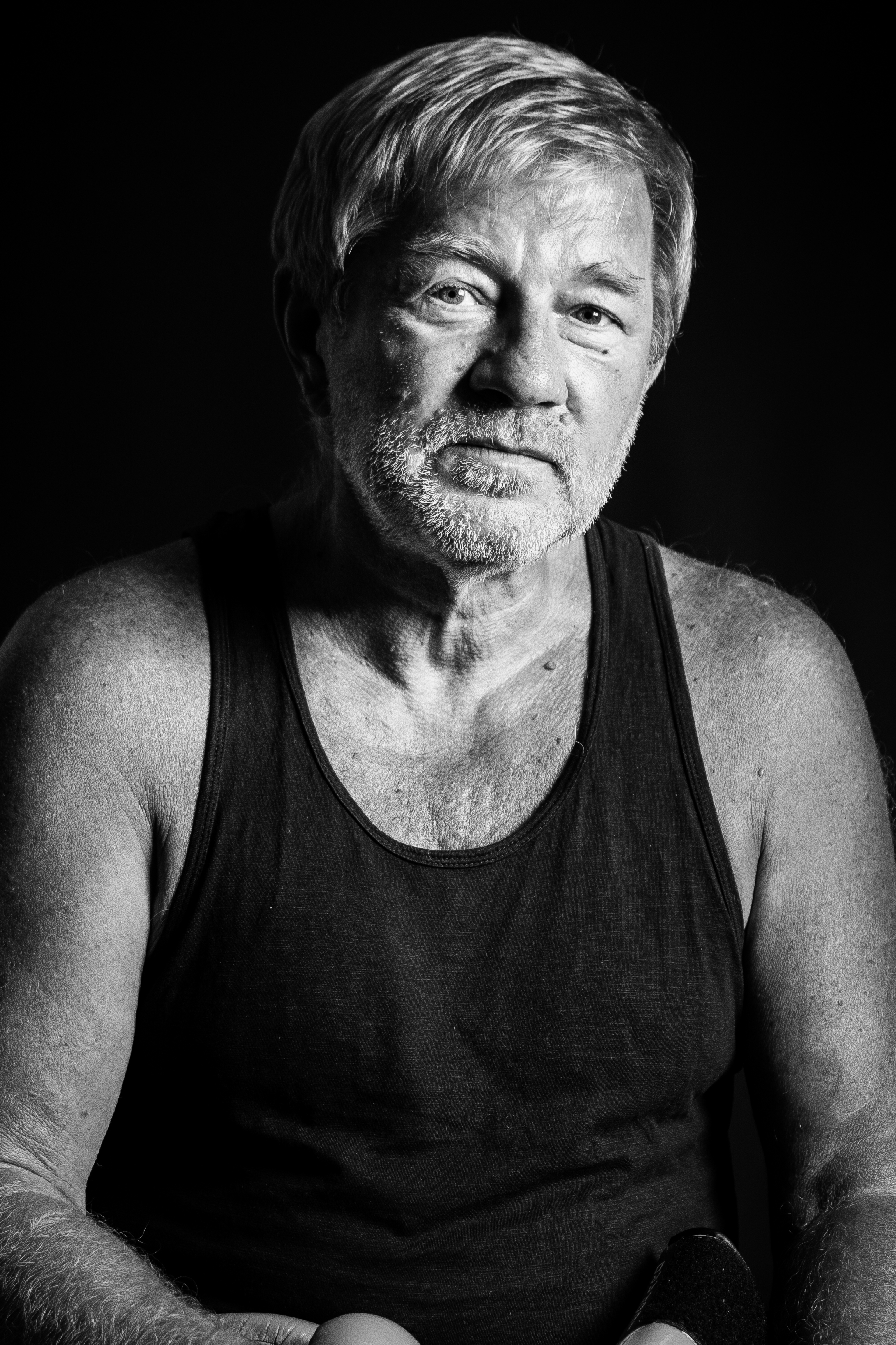 Tašo Andjelkovski